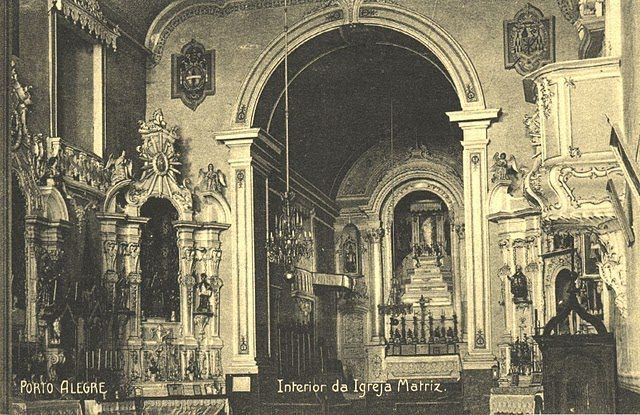 Interior da antiga Matriz da Mãe de Deus de Porto Alegre.